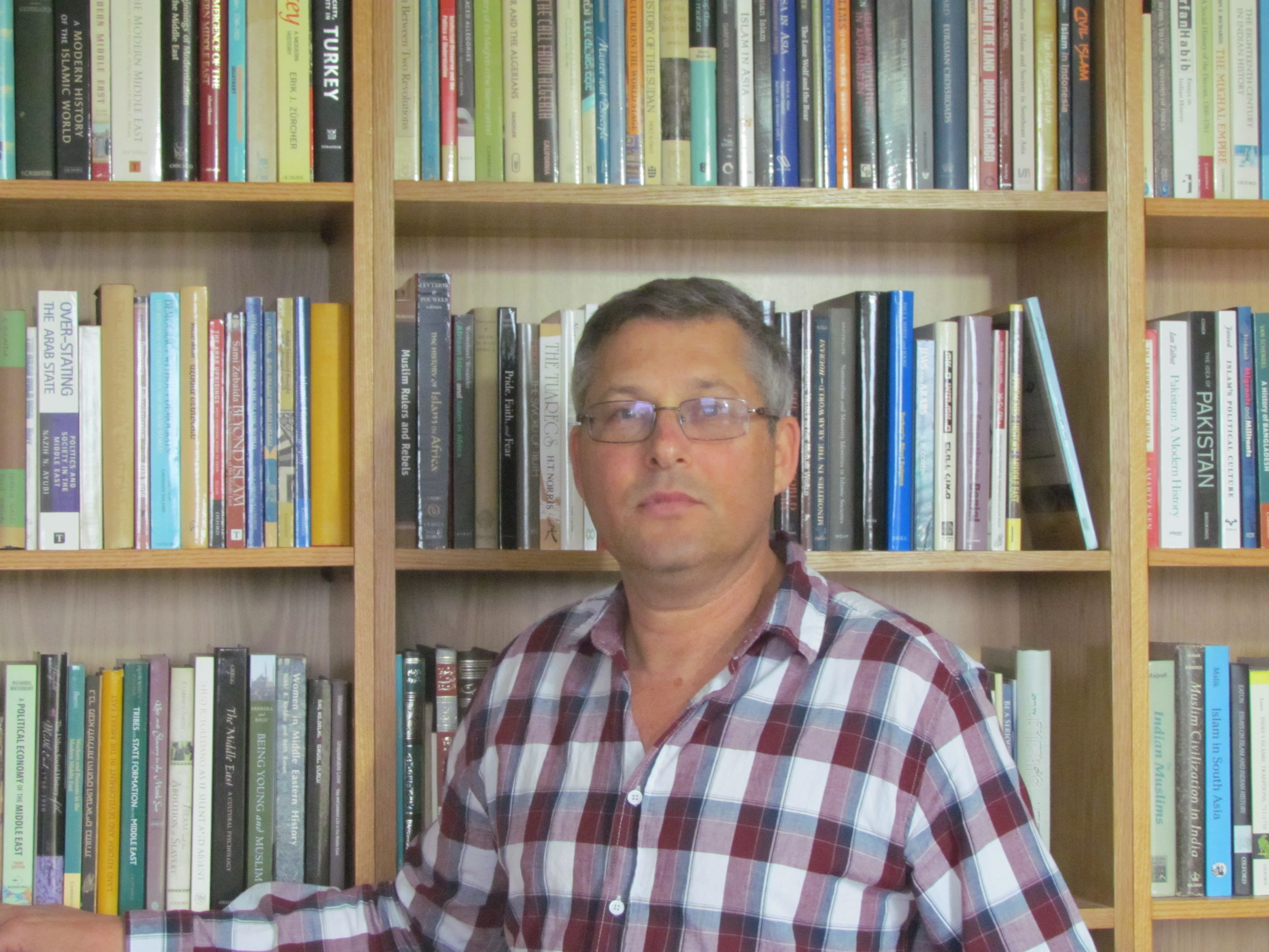 פרופסור יצחק ויסמן